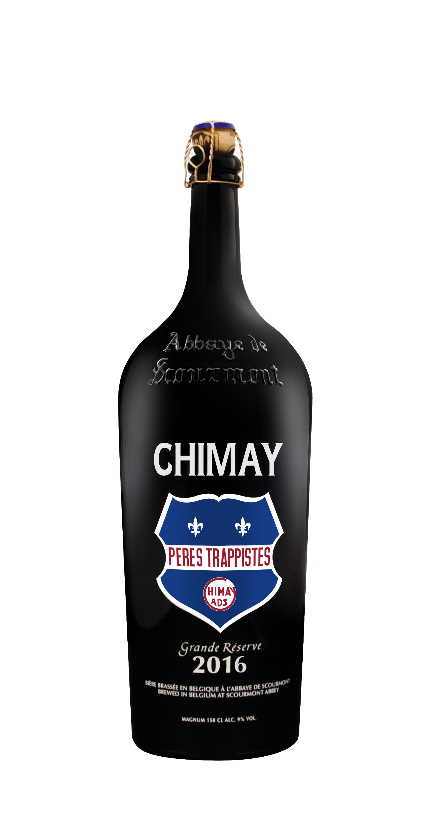 Magnum Grande Réserve 2016